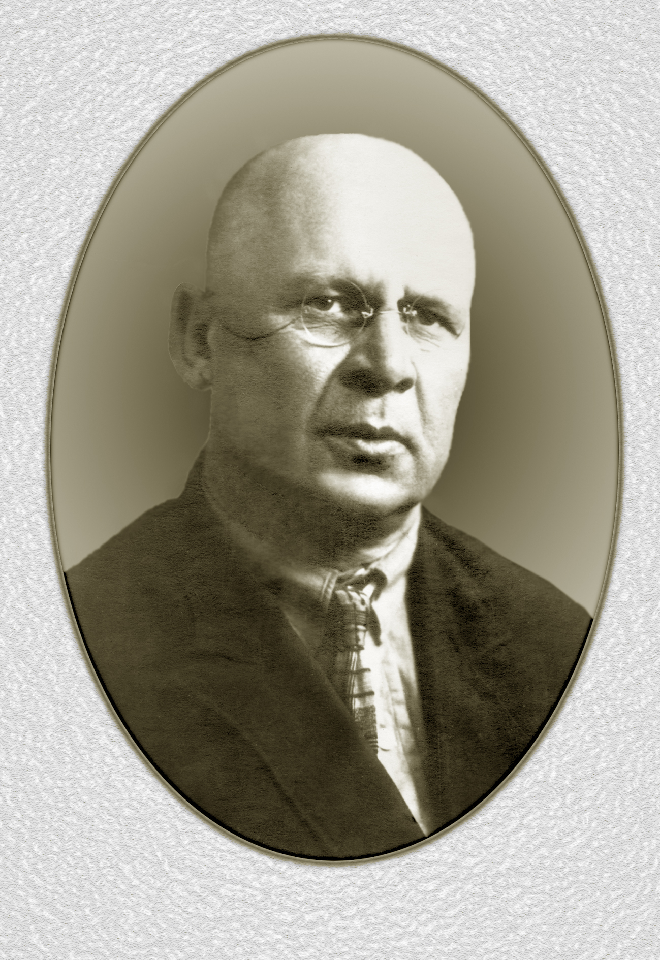 Авиаконструктор Дмитрий Павлович Григорович